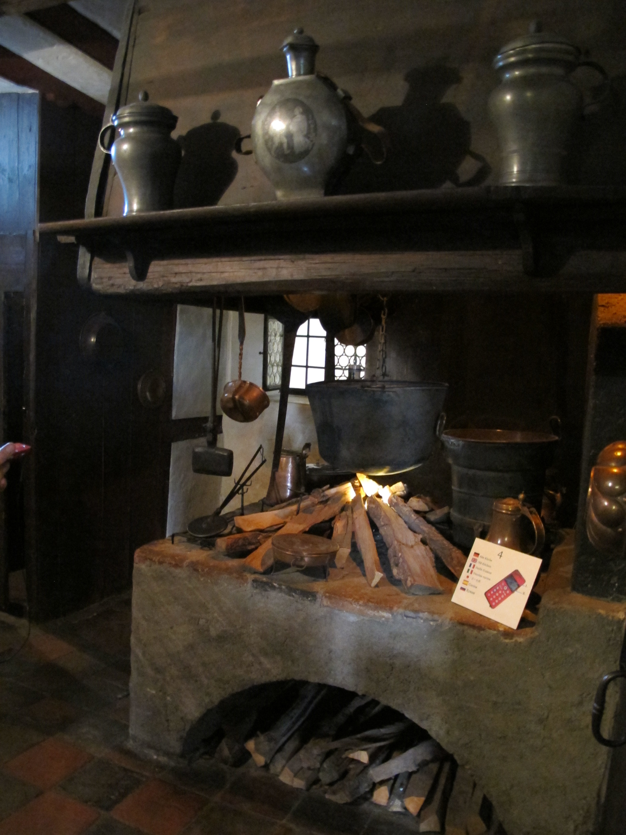 Albrecht-Dürer-Haus, interno 07 cucina